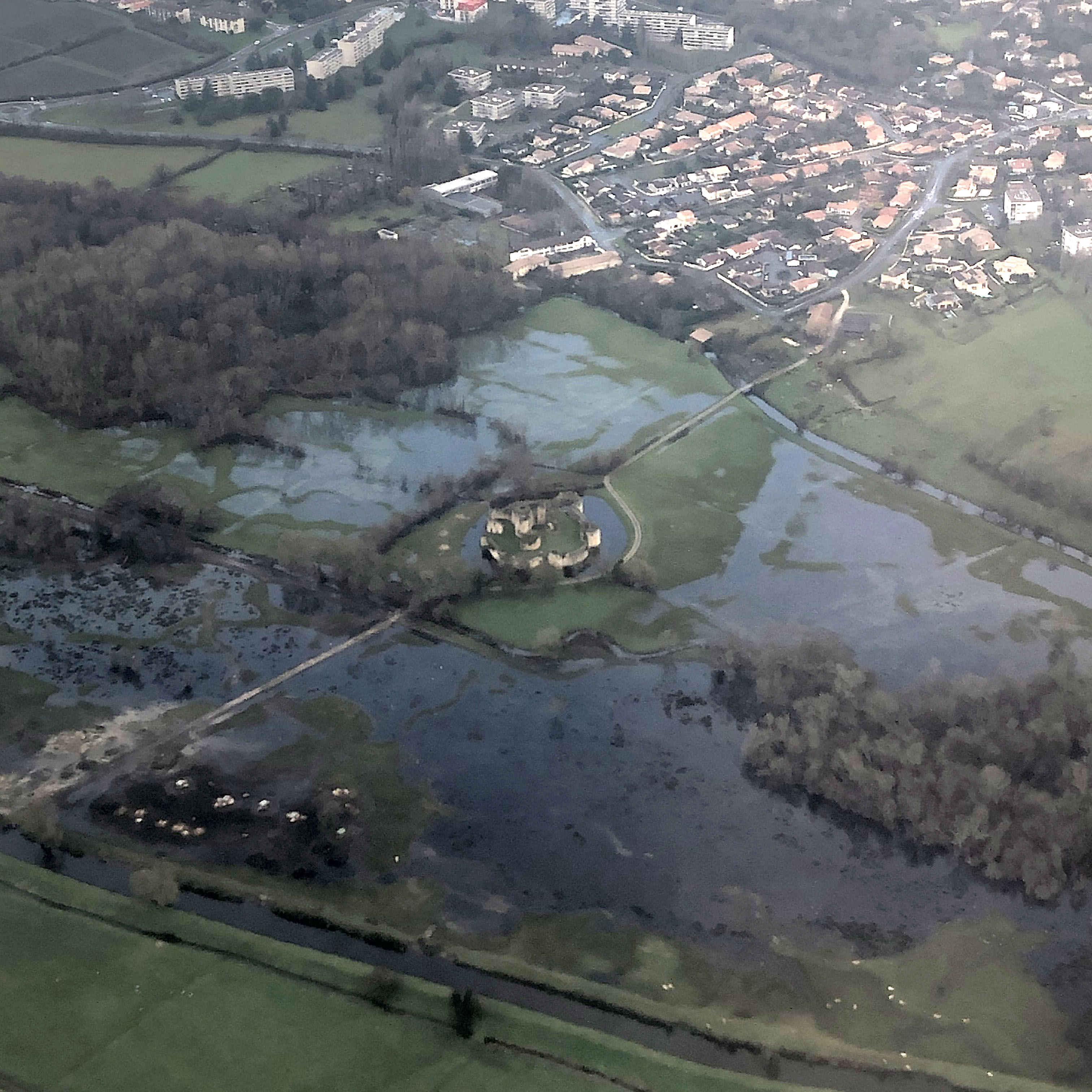 Vue aérienne du château de Blanquefort dans la vallée de la Jalle en période d'inondation (décembre 2019)